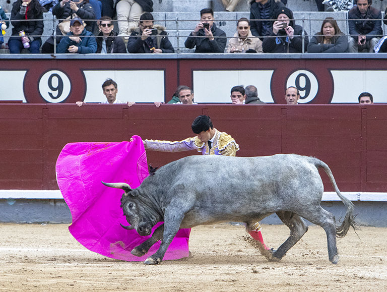 Fotografía donde se puede apreciar al torero Saúl Jiménez Fortes en el transcurso de una de sus faenas.